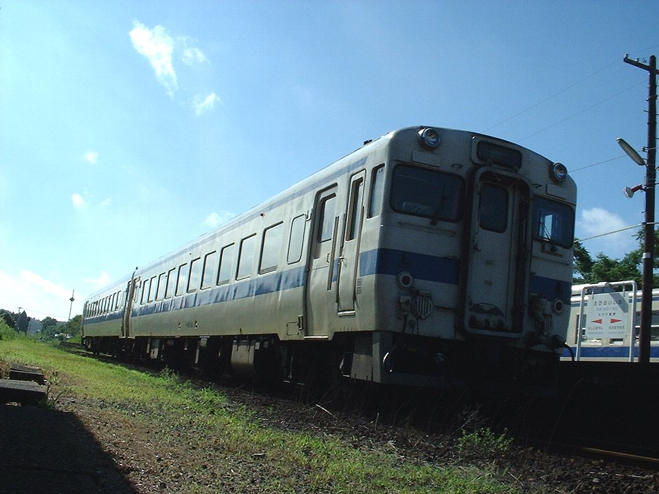 えびの飯野駅構内 交換中の気動車